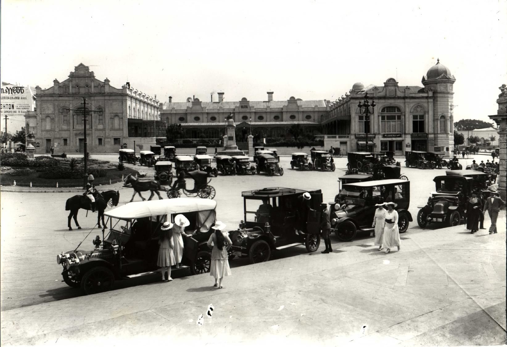 Comedor y salones del Hotel Bristol en Mar del Plata, Argentina. Vistos desde el Boulevard Marítimo.